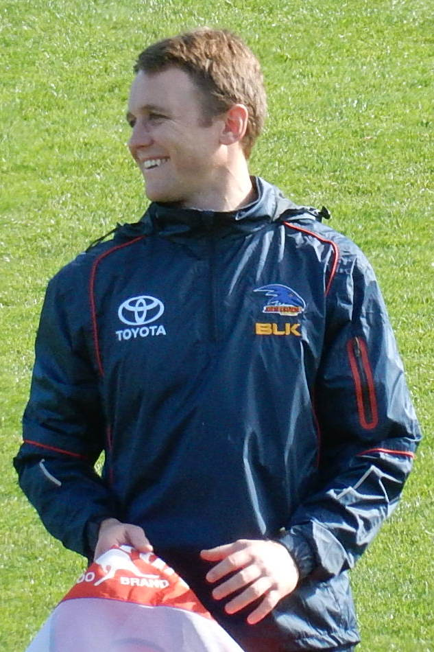 Brent Reilly